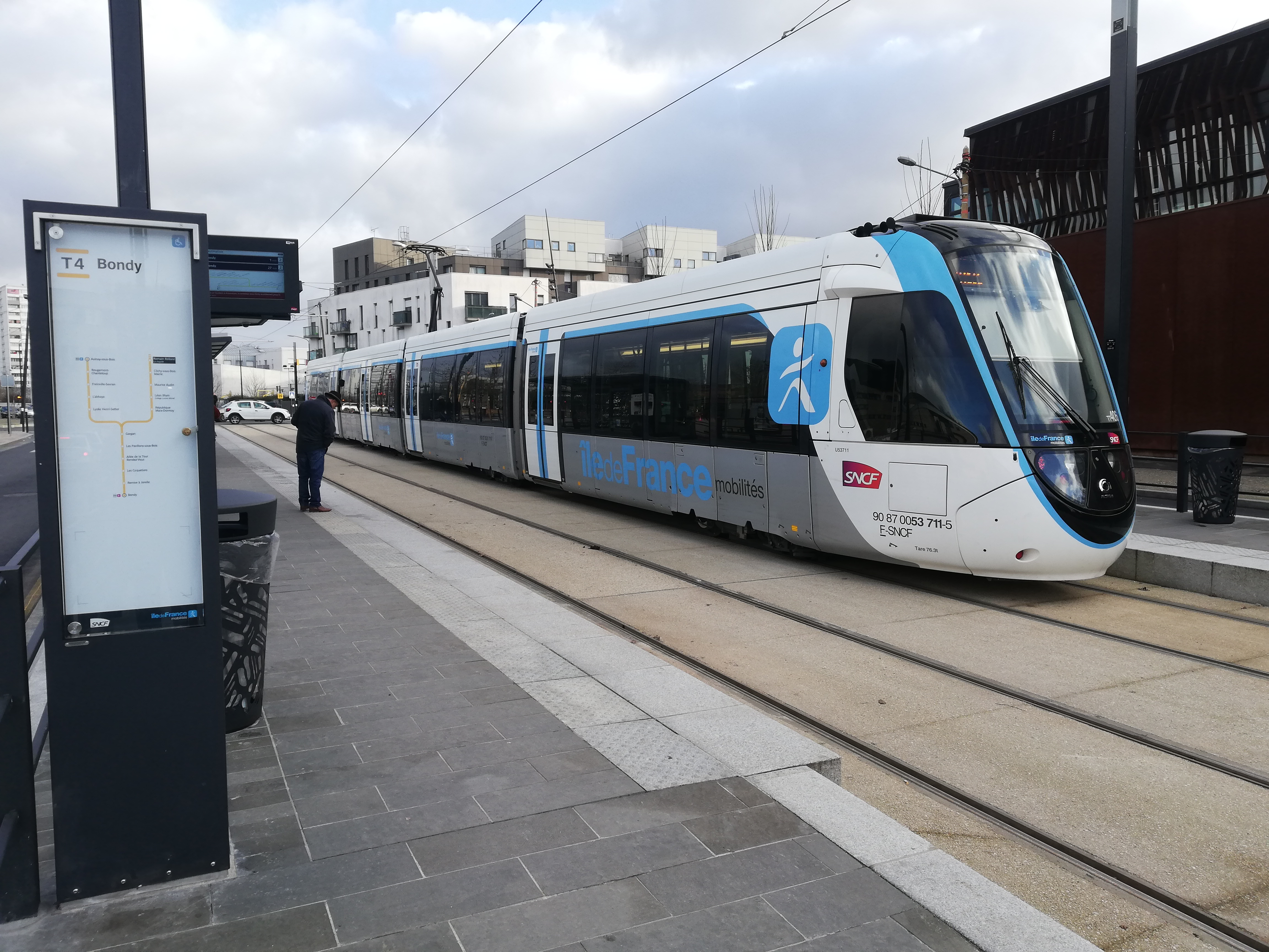 Un Citadis Dualis (U 53700) stationne à la station Romain Rolland de la ligne 4 du tramway d'Île-de-France en 2020.